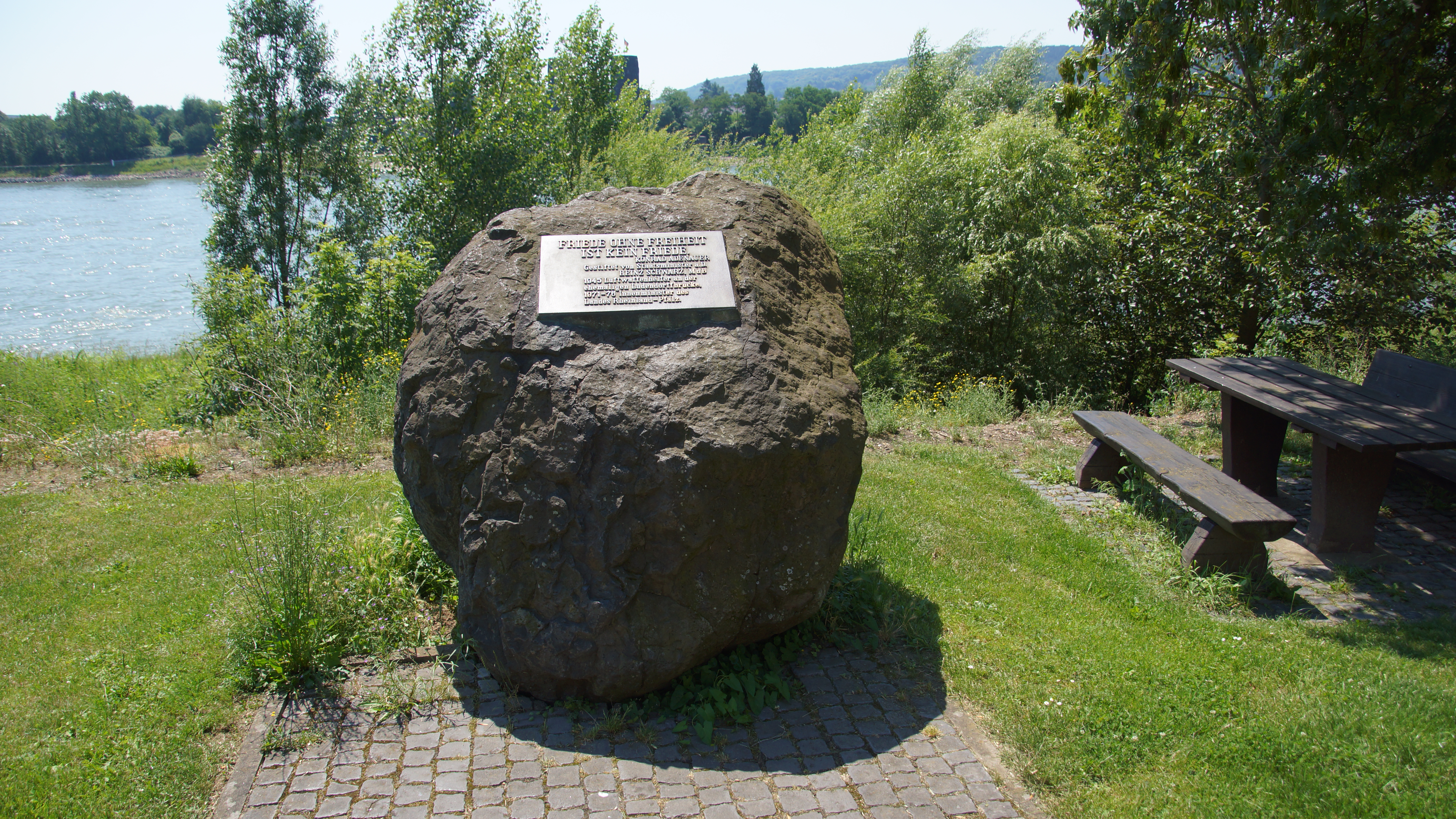 Gedenktafel und -stein mit den Worten des ersten Bundeskanzlers Konrad Adenauer: "Friede ohne Freiheit ist kein Friede" in Erpel, gestiftet 1988 von Heinz Schwarz MdB, Innenminister a. D. von Rheinland-Pfalz